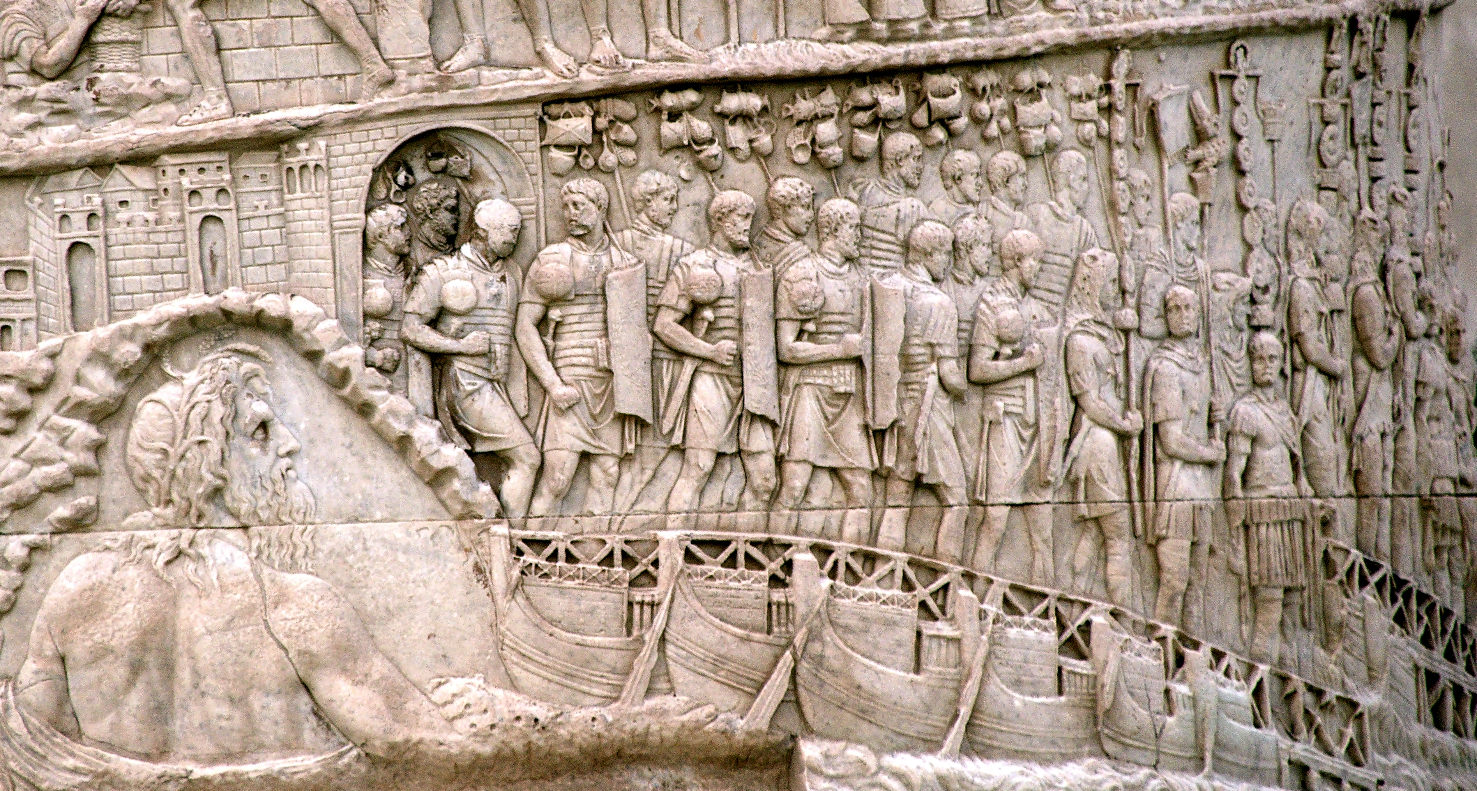 Die Legion in angedeuteter Marschformation auf der Trajansäule.